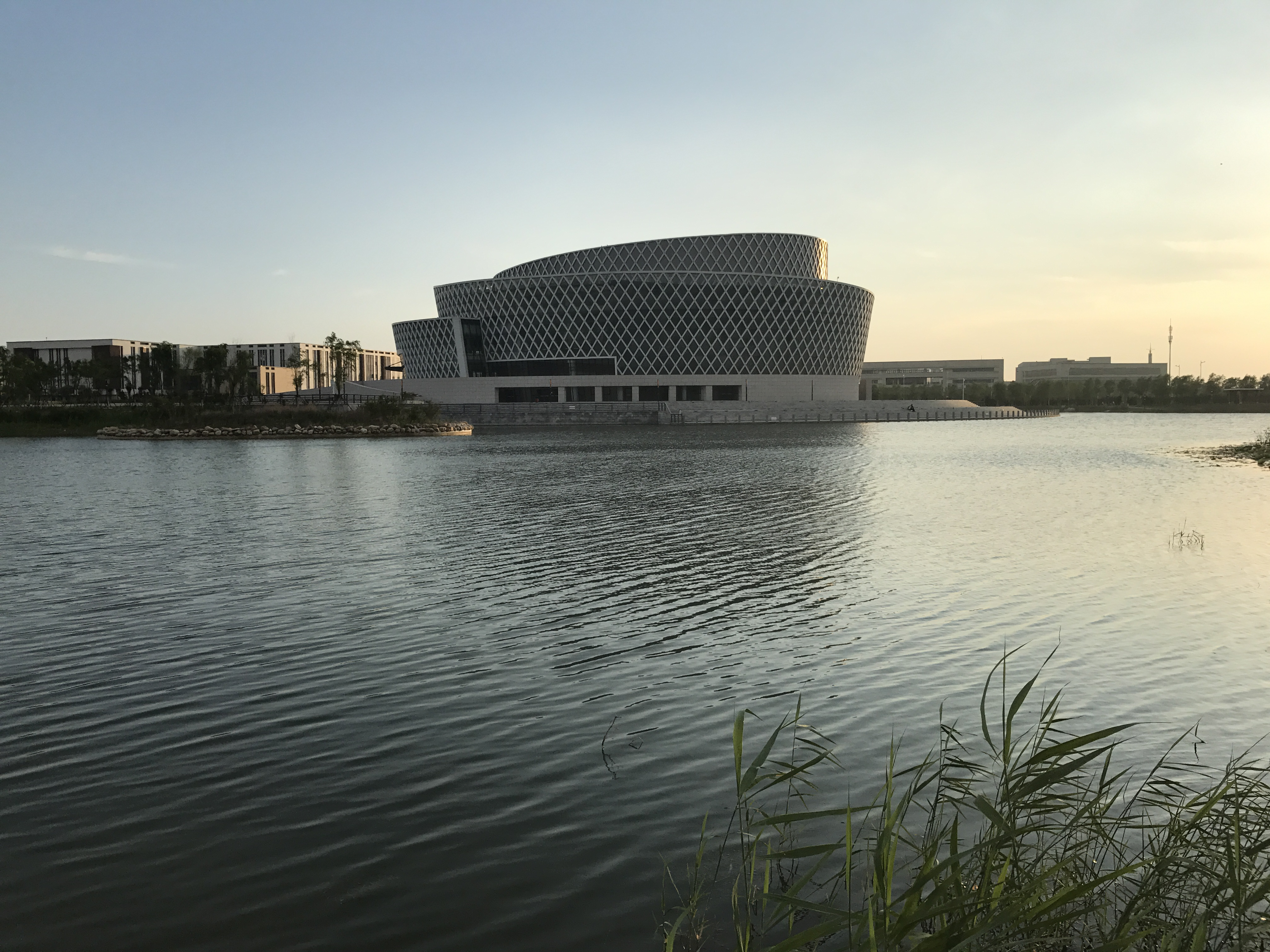 华北理工大学静湖